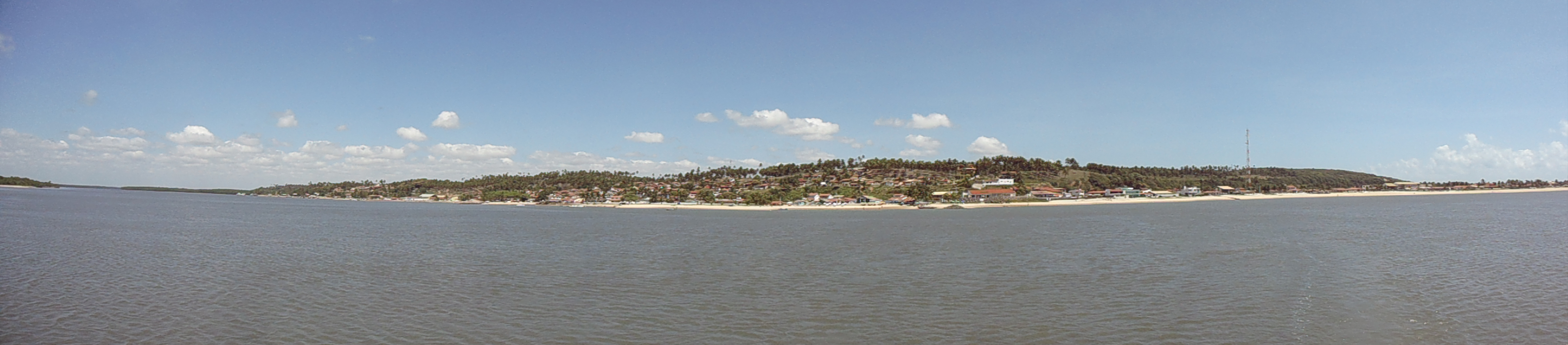 Barra do Cunhaú em Canguaretama, Rio Grande do Norte, Brasil..